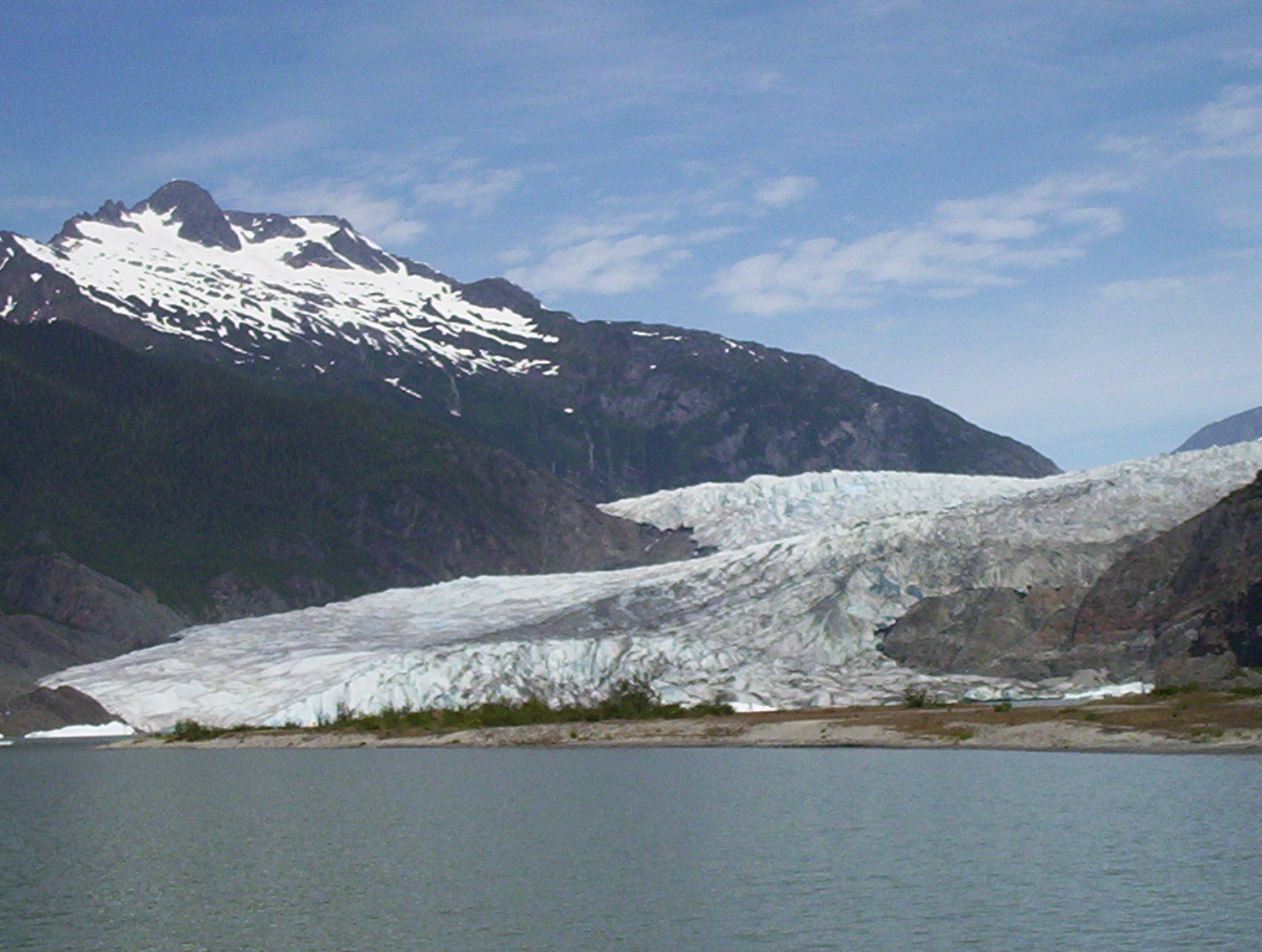 Mendenhall Glacier/Mendenhall Lake